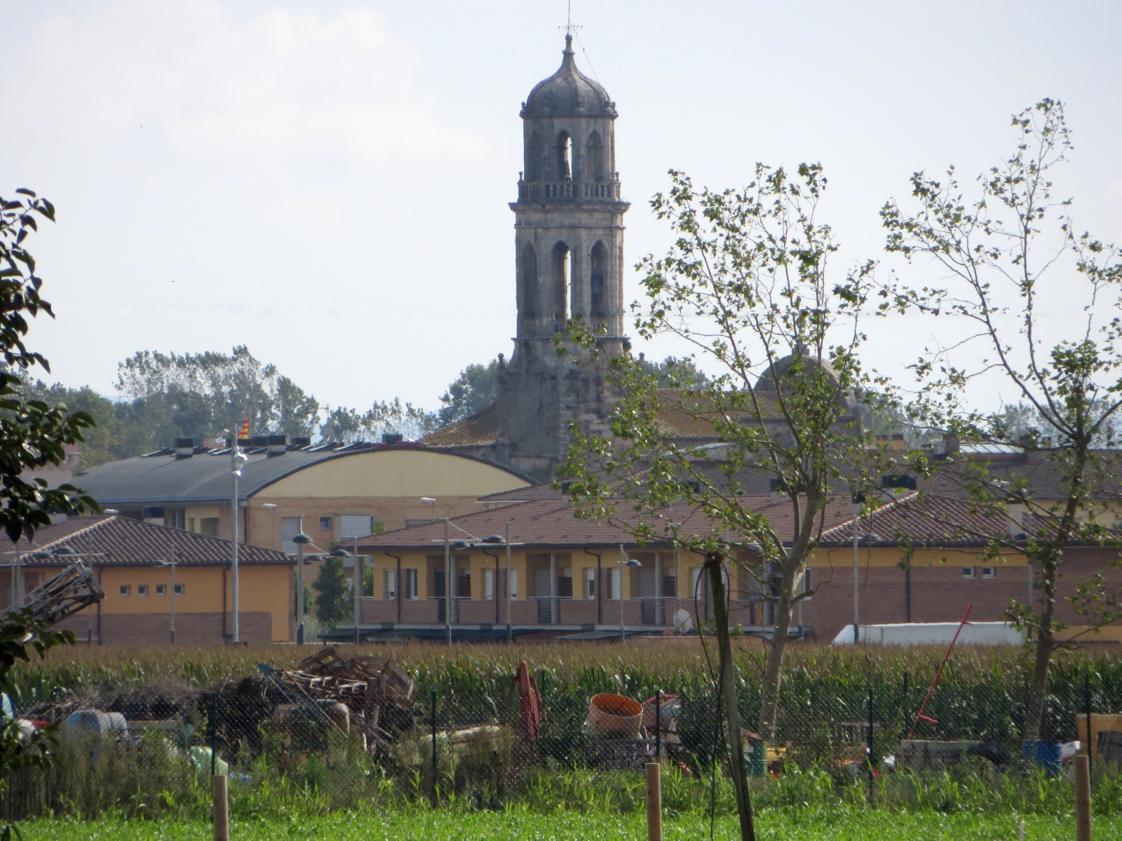 Ort: Vilobí d'Onyar Bezirk: La Selva Provinz: Girona Nahe dem Flughafen Girona (GRO)